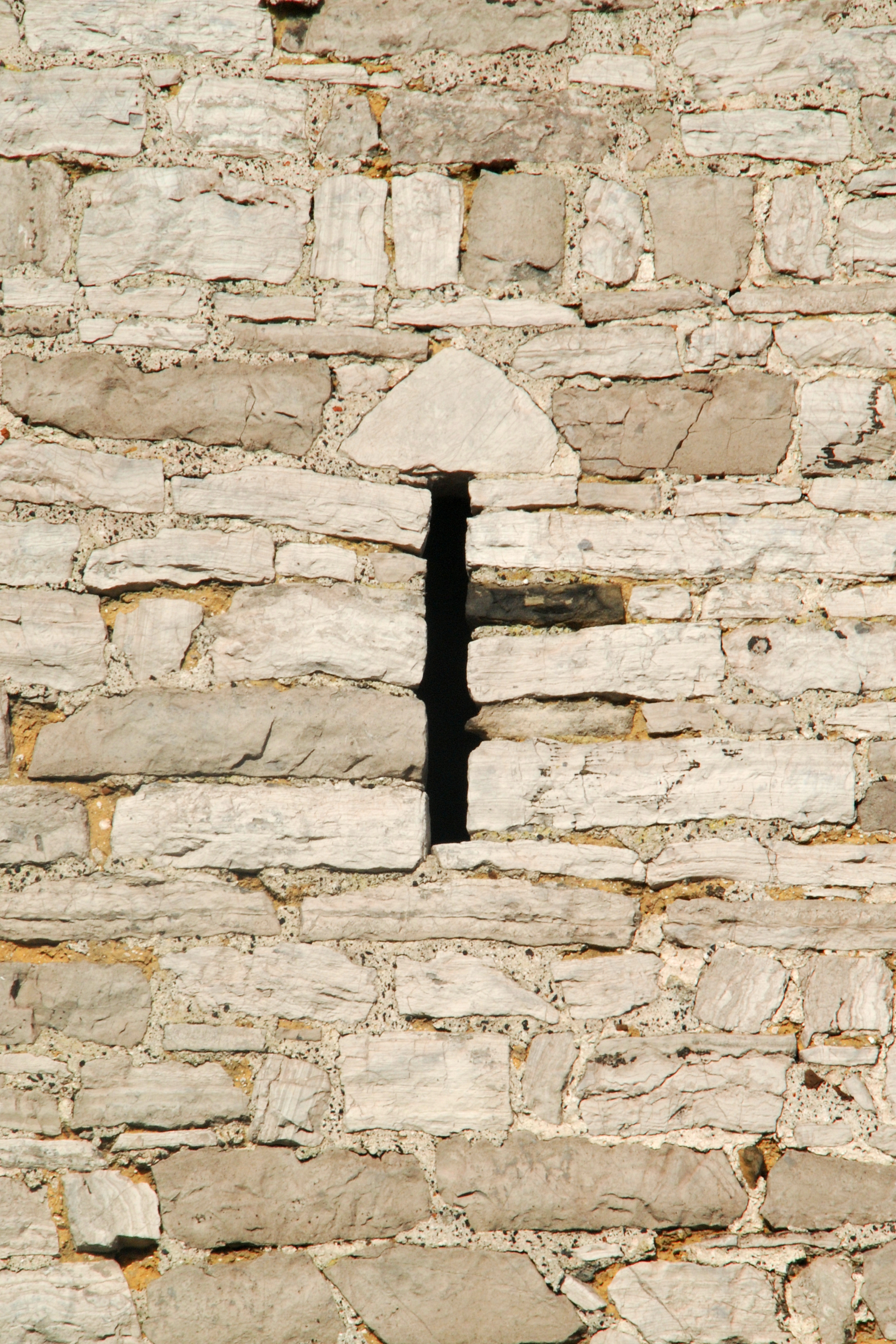 Belgique - Hainaut - Aiseau-Presles - Pont-de-Loup - Tour romane